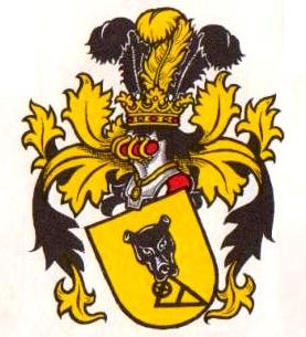 Wappen der österreichischen Adelsfamilie von Mederer Edle von Wuthwehr (1789)